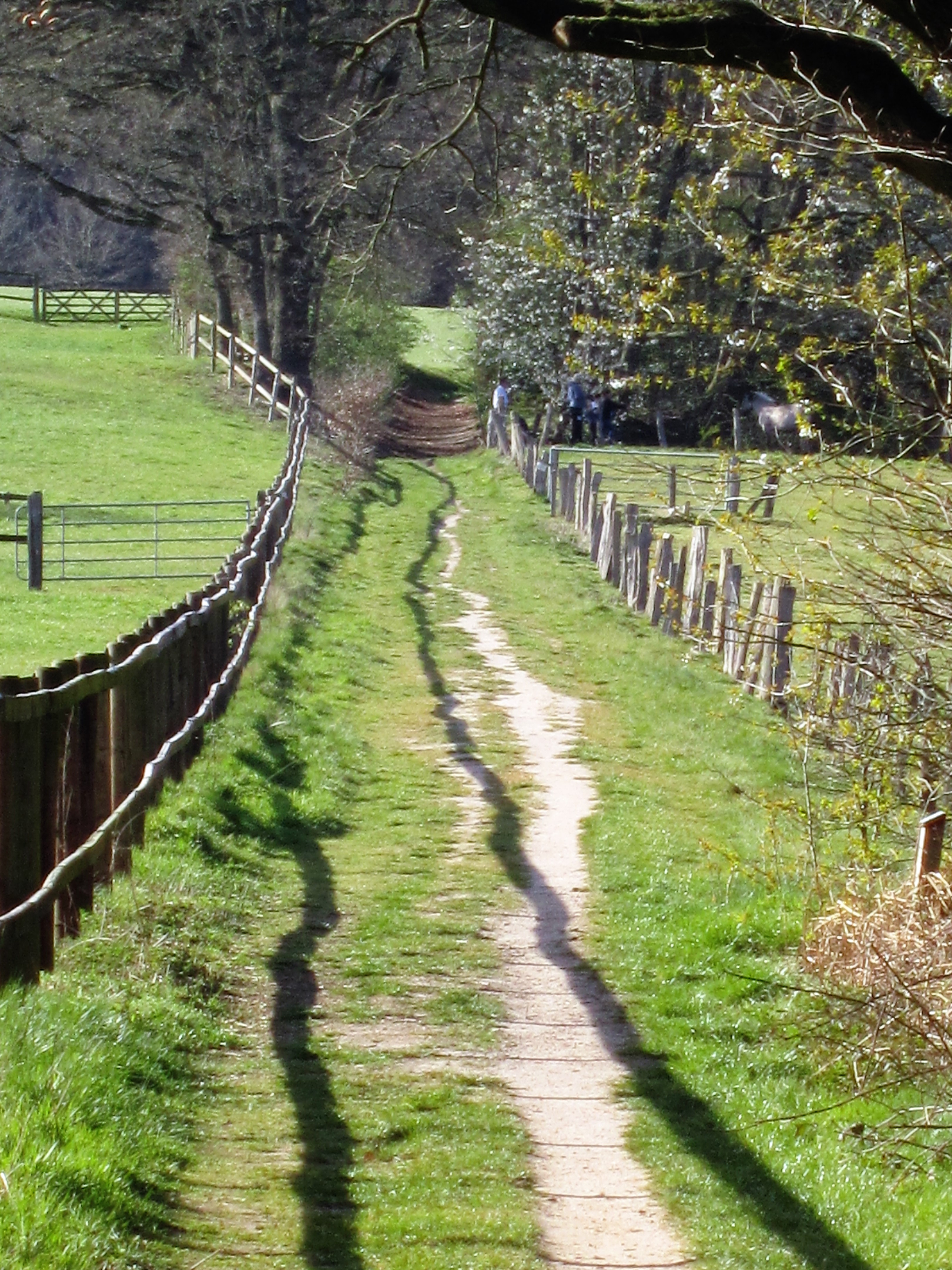 Der Kardinalsweg, ein vom Hotel Kloster Damme über Holdorf zur Burg Dinklage führender 24 km langer Wanderweg, verläuft in seinem ersten Abschnitt durch das Tal der Bexadde.